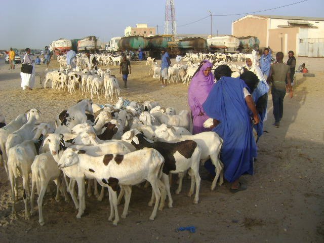 Mauritanian livestock herders say prices are up this year in part due to instability in Mali. مربو الماشية الموريتانيون يقولون إن الأسعار مرتفعة هذه السنة بفعل الاضطرابات في مالي نسبيا. Les éleveurs de bétail mauritaniens expliquent que les prix sont orientés à la hausse cette année par suite de l'instabilité au Mali.